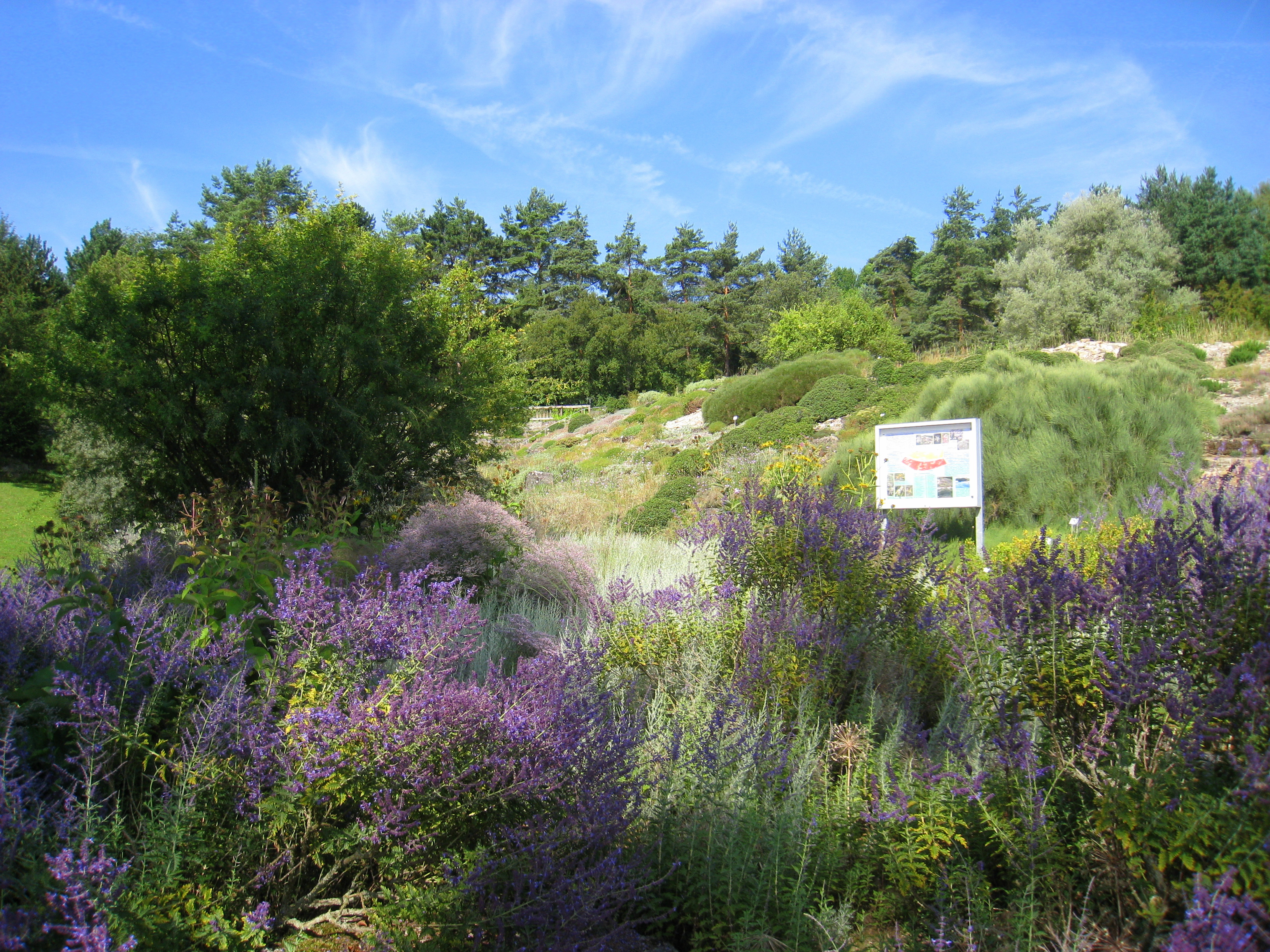 General view - Botanischer Garten der Universität Würzburg, Würzburg, Germany.